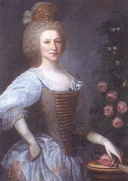 Géczy Julianna a „lőcsei fehér asszony”.